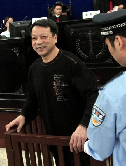 戴国森受审